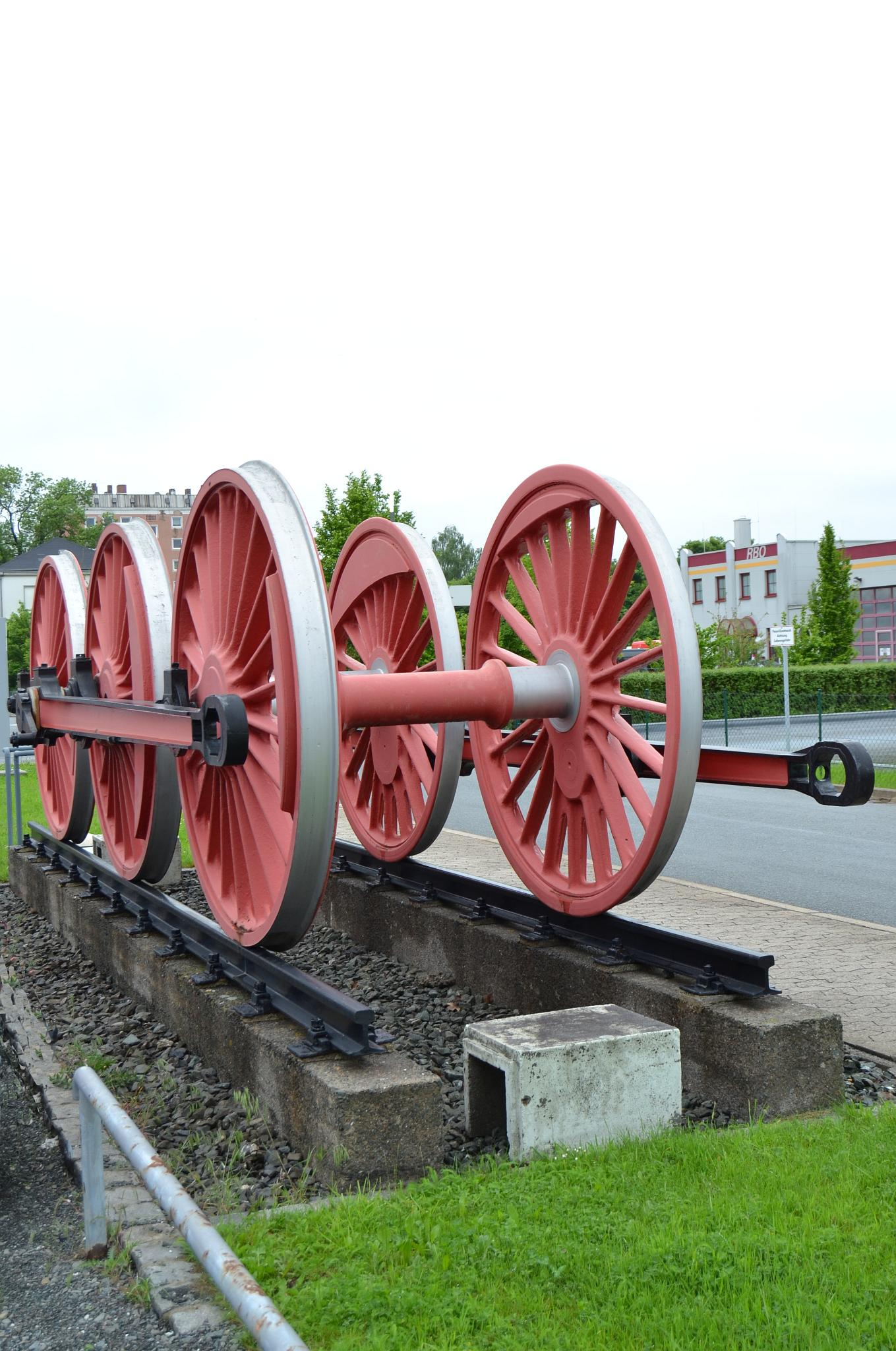 Treibradsatz der 01 088 als Denkmal im Bahnbetriebswerk Hof.